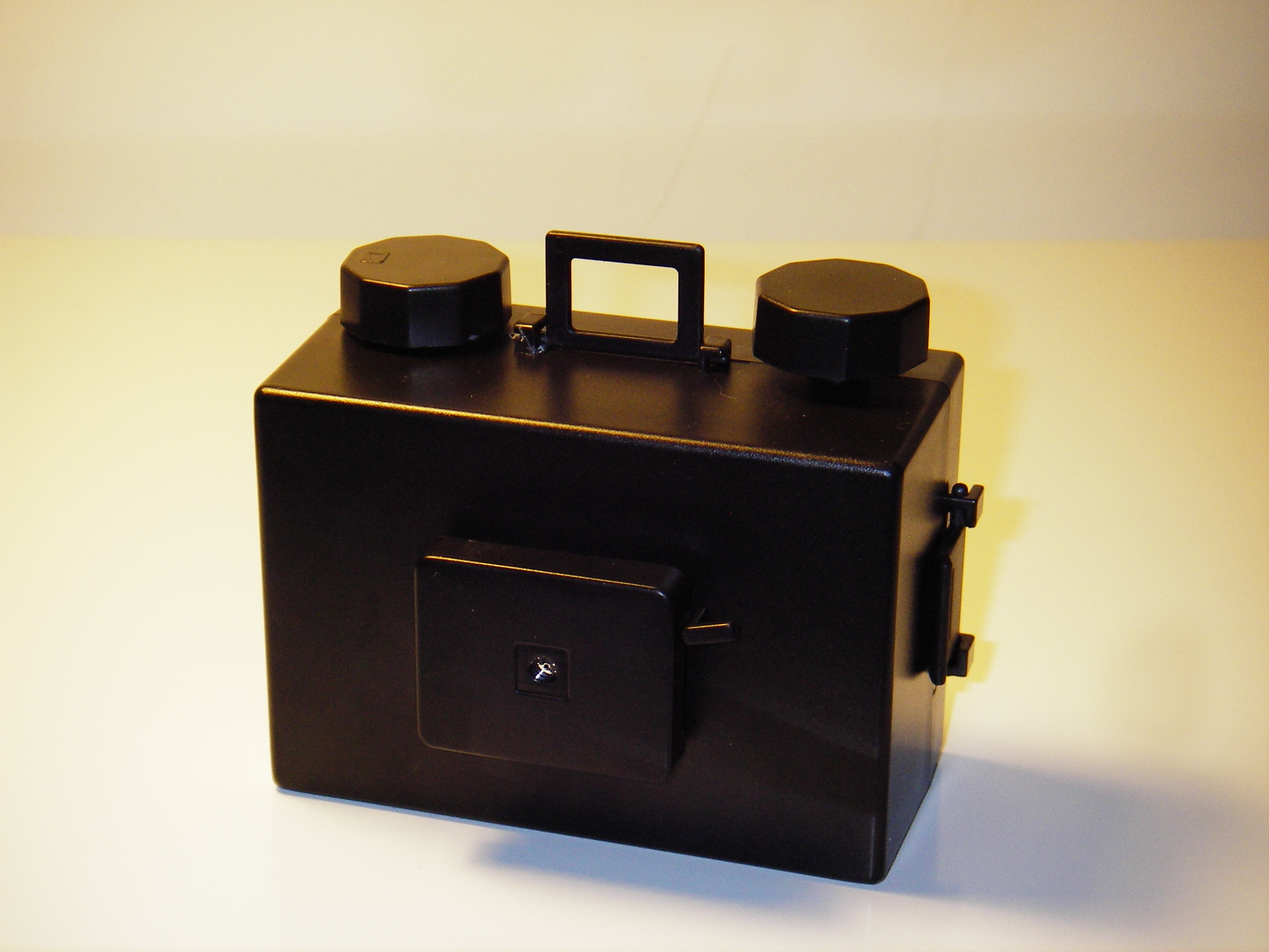 A recent acquisition. Look Ma! No lens!